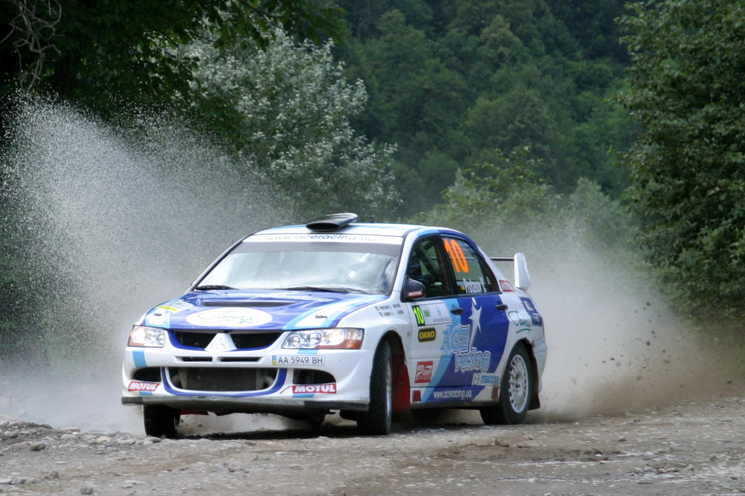 Фото экипажа Юрий Протасов - Александр Горбик сделано на этапе чемпионата Украины, ралли "Трембита"